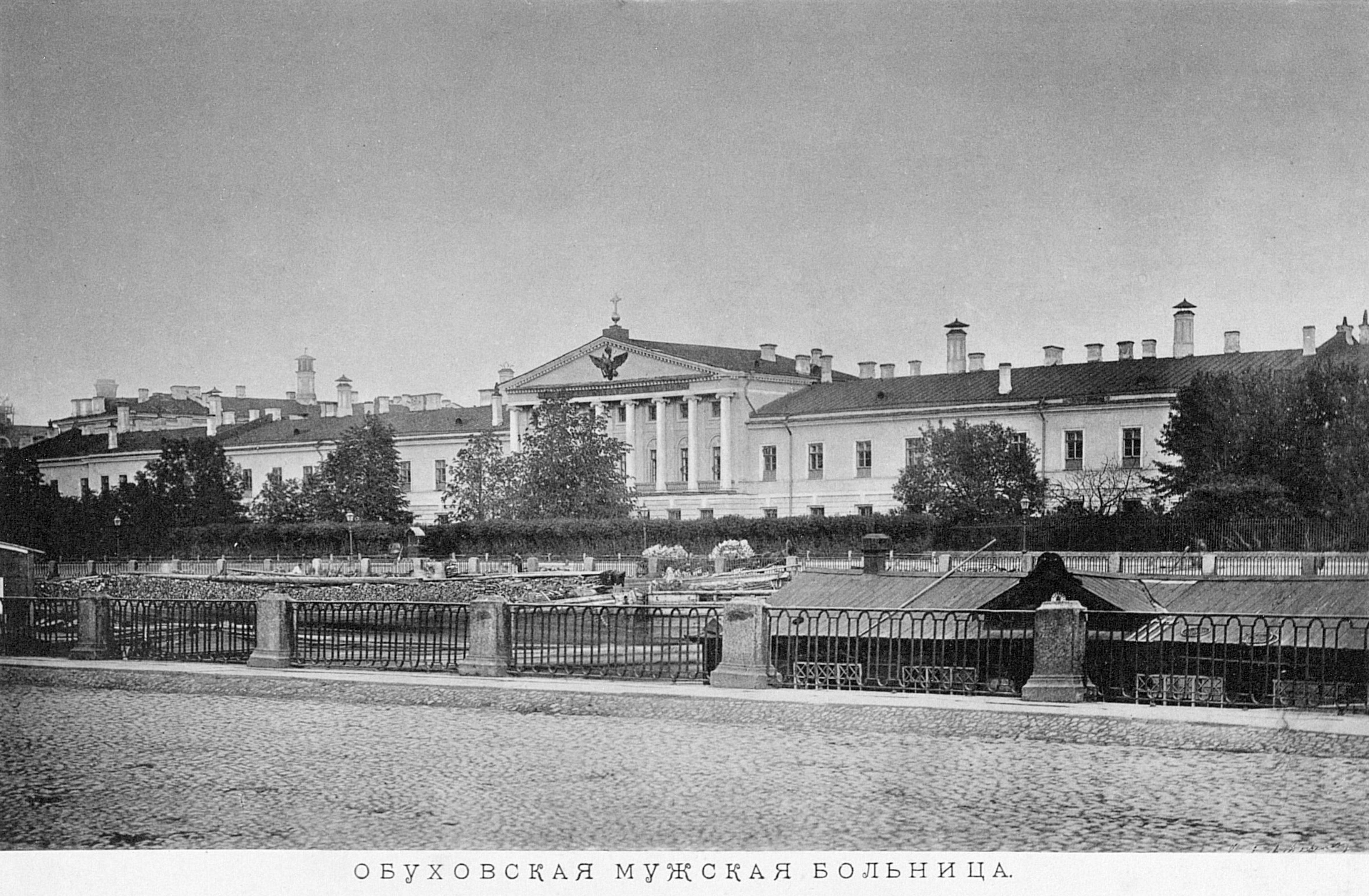 Обуховская мужская больница, 1870-е годы